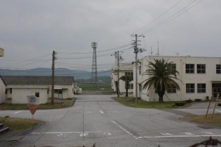 高知駐屯地第２営舎地区